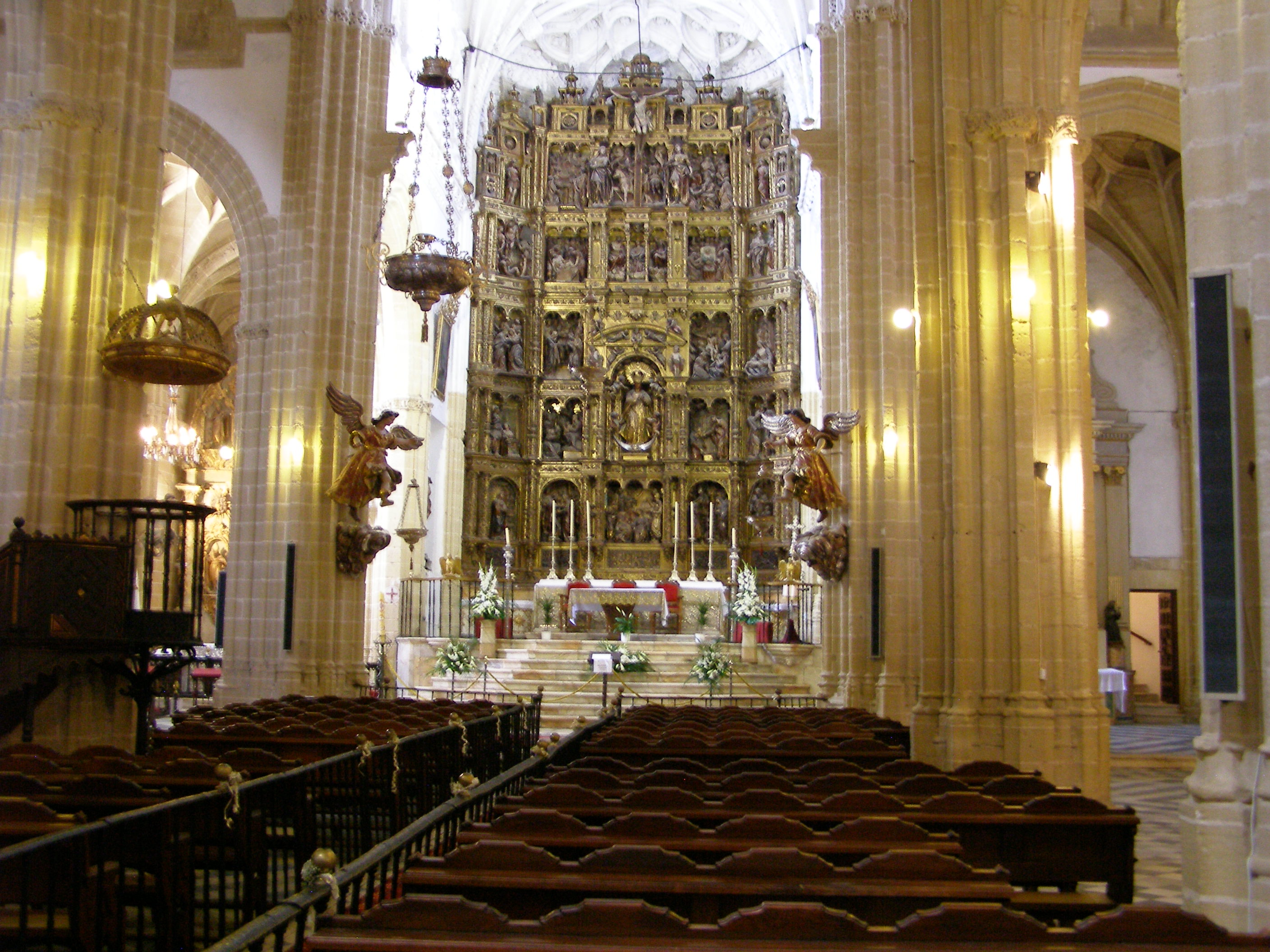 Retablo de la Iglesia de Santa María la Coronada (S. XVI)